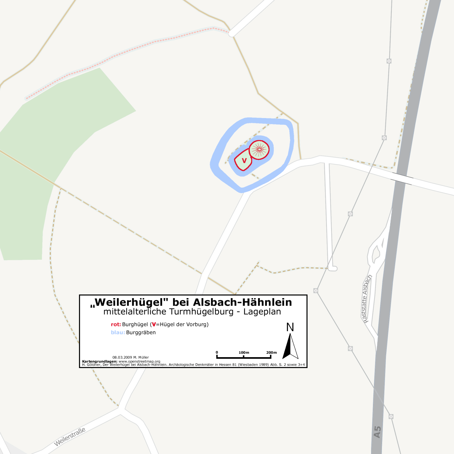 Weilerhügel, frühmittelalterliche Turmhügelburg bei Alsbach-Hähnlein. Lageplan.